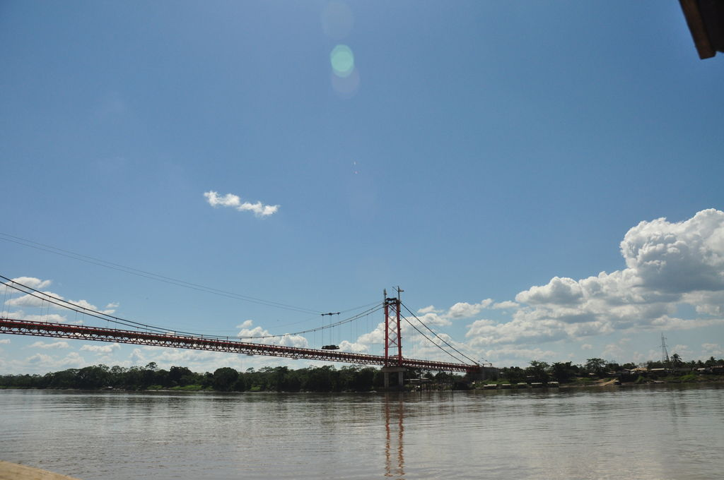 Aldo Santos